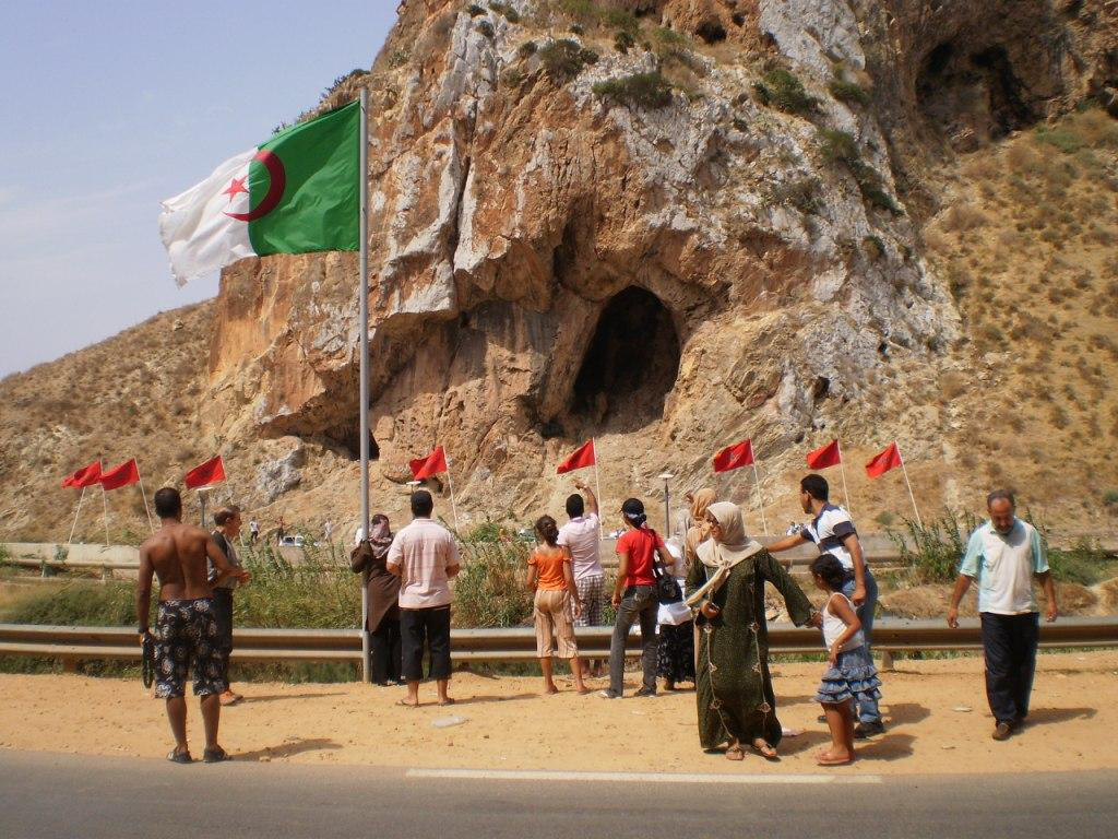 Endroit frontalier où Marocains et Algériens se saluent.